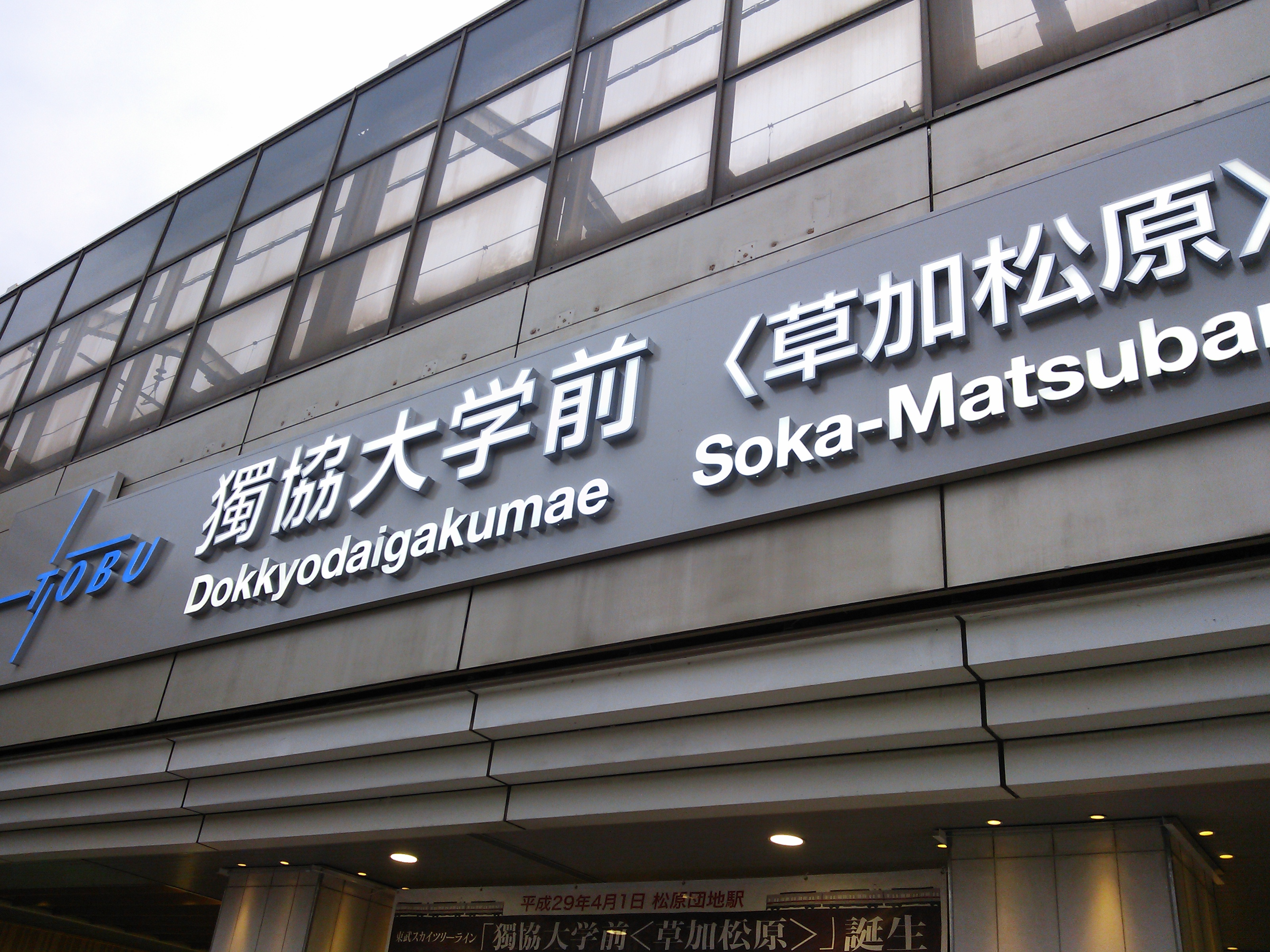 獨協大学前駅西口